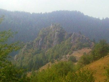 Ostaci srednjovekovnog kastruma Koznika, u selu Kozica kod Pljevalja